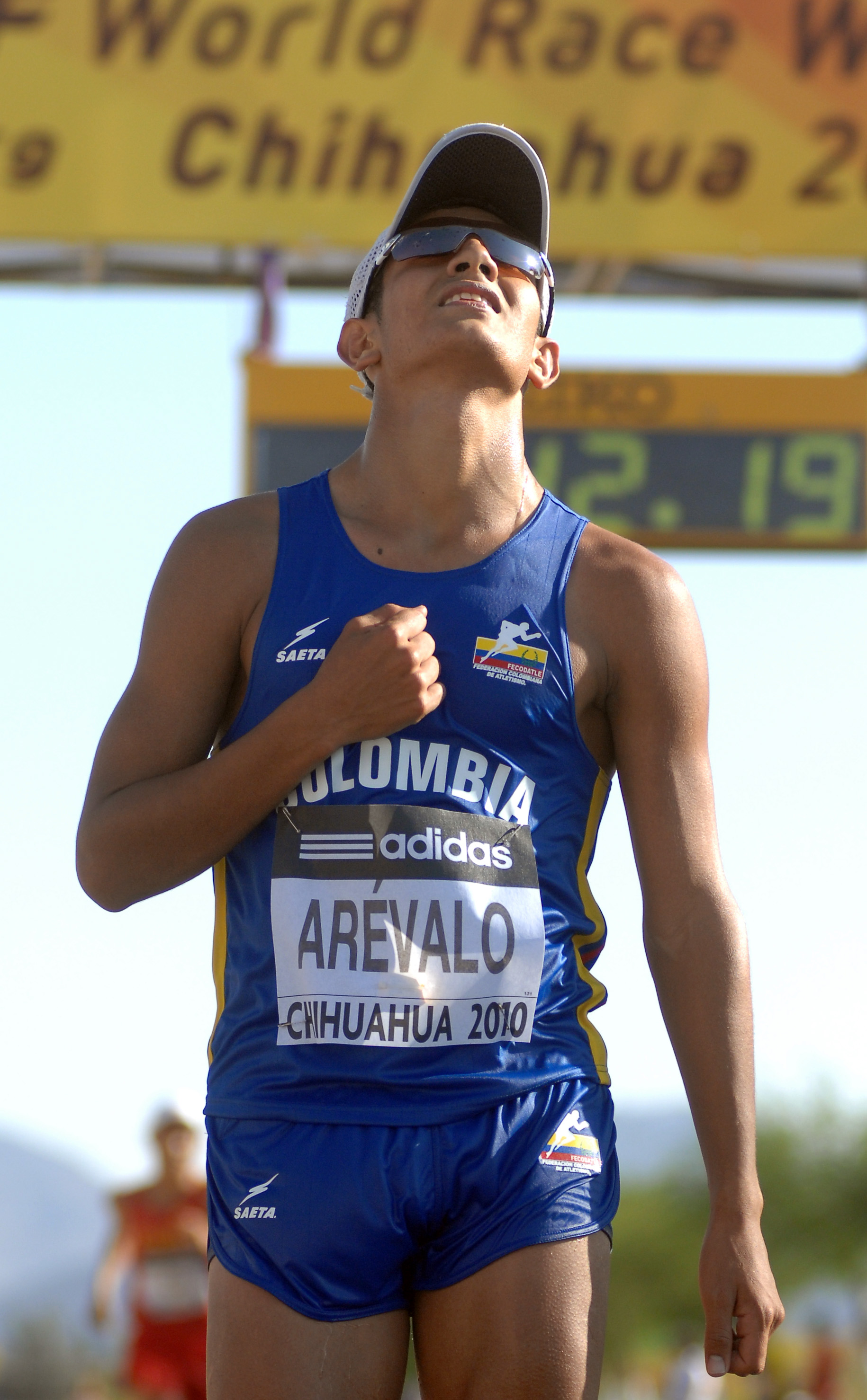 Eider Arevalo campeon mundial juvenil chihuahua mexico 2010